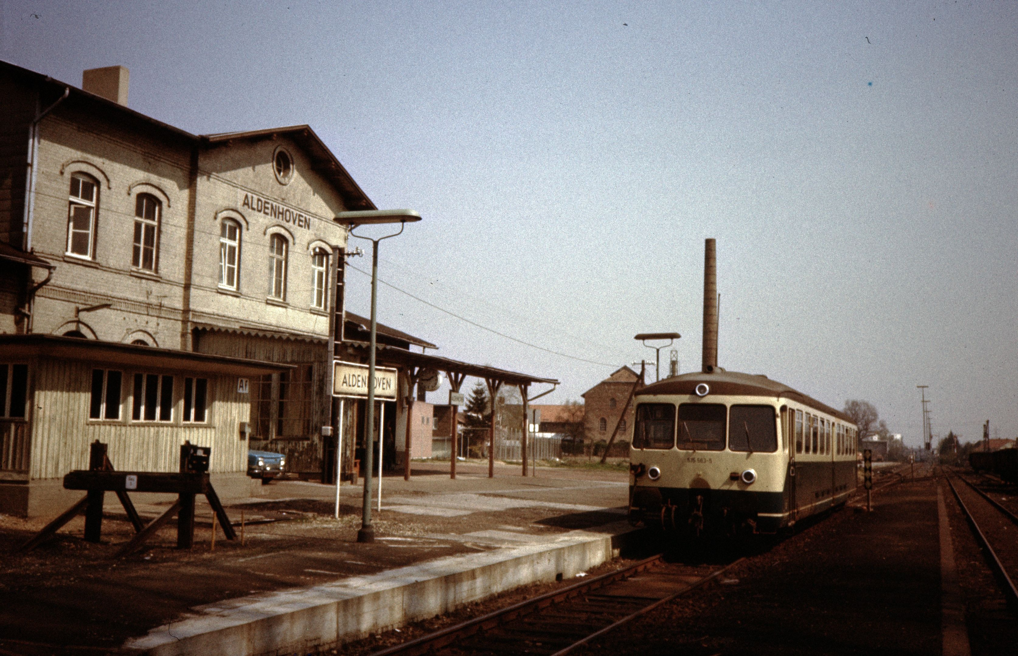 Am Freitag, den 30. Mai 1980 verkehrte zum letzten Mal ein Personenzug auf der Strecke Jülich - Aachen Nord. Wenige Wochen zuvor wurde im März oder April 1980 dieser Zug im Bahnhof Aldenhoven fotografiert. Es handelt sich um den Akkutriebwagen 515 563-5 als Zug Nt 8252, einer von fünf Zügen pro Werktag und Richtung, die im letzten Betriebsjahr zwischen Aachen Nord und Jülich verkehrten. (Ein weiteres Zugpaar verkehrte auf dem Abschnitt Aachen Nord - Mariagrube.) Die Bahnhofsuhr zeigt 13.44 Uhr, was die Identifizierung dieses Zuges ermöglicht. Der Fahrplan dieses Zuges: Jülich ab 13.32 - Aldenhoven Ost ab 13.43 (Halt nur bei Bedarf) - Aldenhoven ab 13.47 - Mariagrube an 14.01 / ab 14.02 - Würselen an 14.11 / ab 14.12 - Aachen Nord an 14.21 Uhr. Unmittelbar hinter dem Zug sind zwei Weichen zu erkennen, deren hintere nach links zum Ladestraßen-Gleis führt. Am rechten Bildrand sind offene Güterwagen auf dem Anschlussgleis des Altmetallhandels Sieger zu sehen, die dort mit Schrott be- bzw. entladen wurden. Im Hintergrund stehen zwei Ausfahrsignale, so dass von beiden Hauptgleisen aus Züge in Richtung Jülich ausfahren konnten. Der Fahrdienstleiter saß im Stellwerk "Af", das sich in der Bretterbude vor dem eigentlichen Bahnhofsgebäude befand.